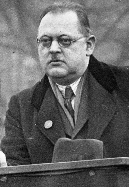 Reichskanzler a.D. Hermann Müller tot! Der verstorbene Reichskanzler a.D. Hermann Müller am Rednerpult.